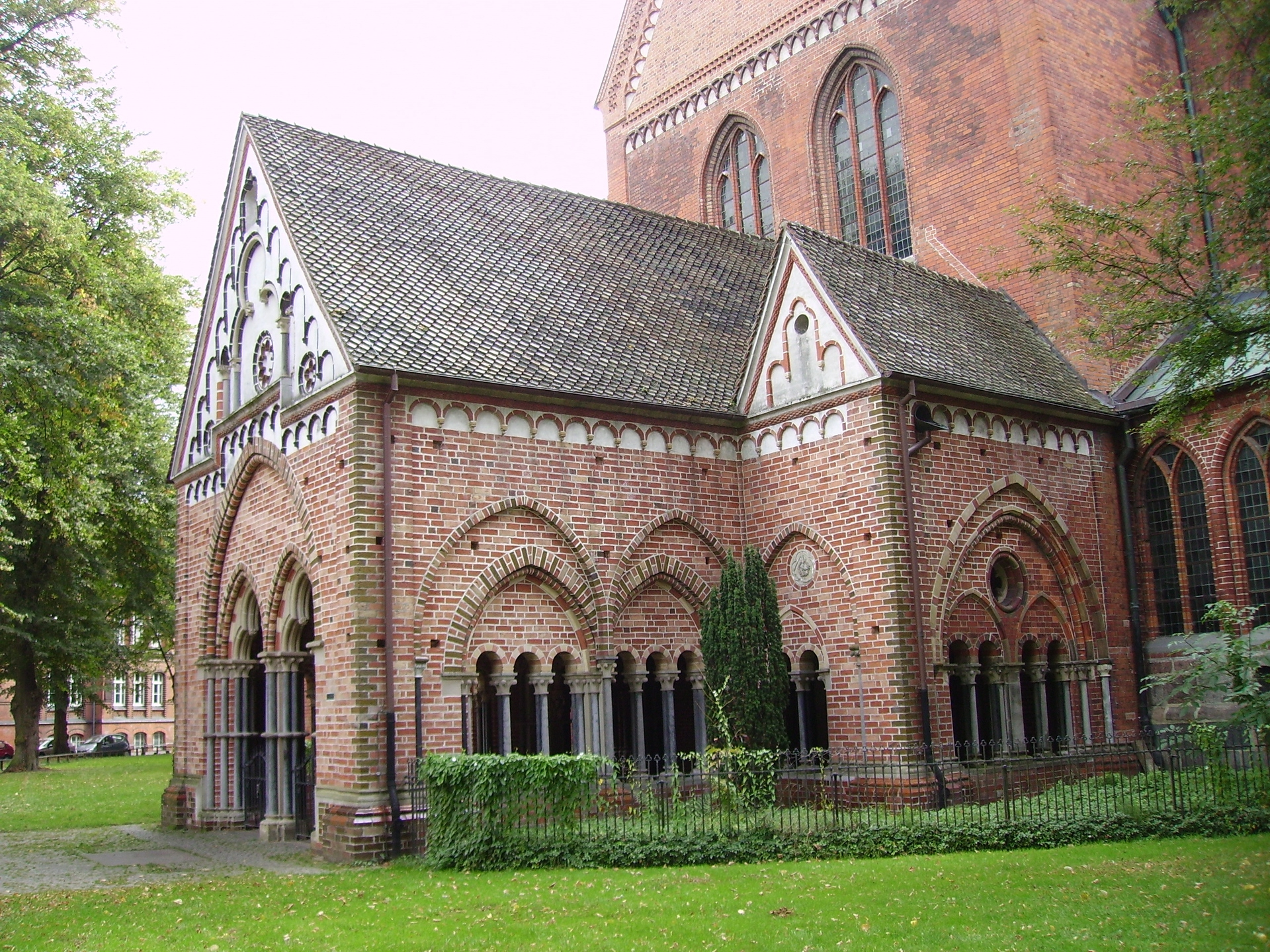 Die Paradies-Vorhalle an der Nordseite des Doms von Lübeck